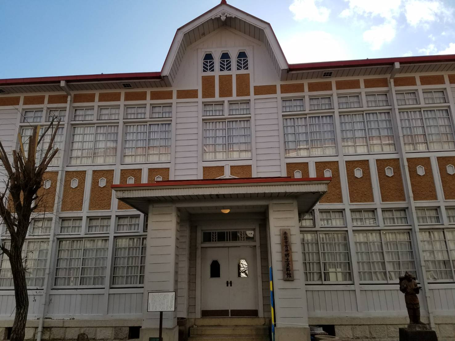 赤磐市吉井郷土資料館入り口前にて2018年1月27日に撮影